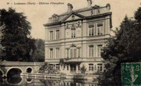 Lomme - Chateau d'Isenghien en 1907